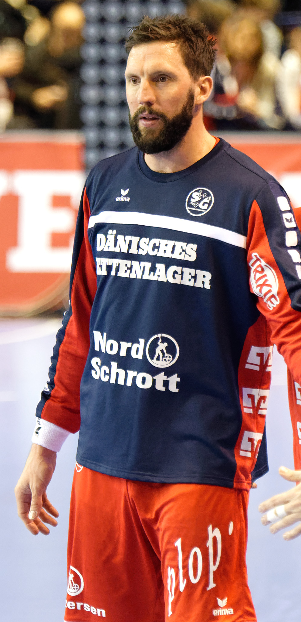 Rencontre de phase de groupe de la Ligue des Champions 2015-16 entre le PSG et SG Flensburg. A la Halle Carpentier (Paris), le 7 mars 2016.